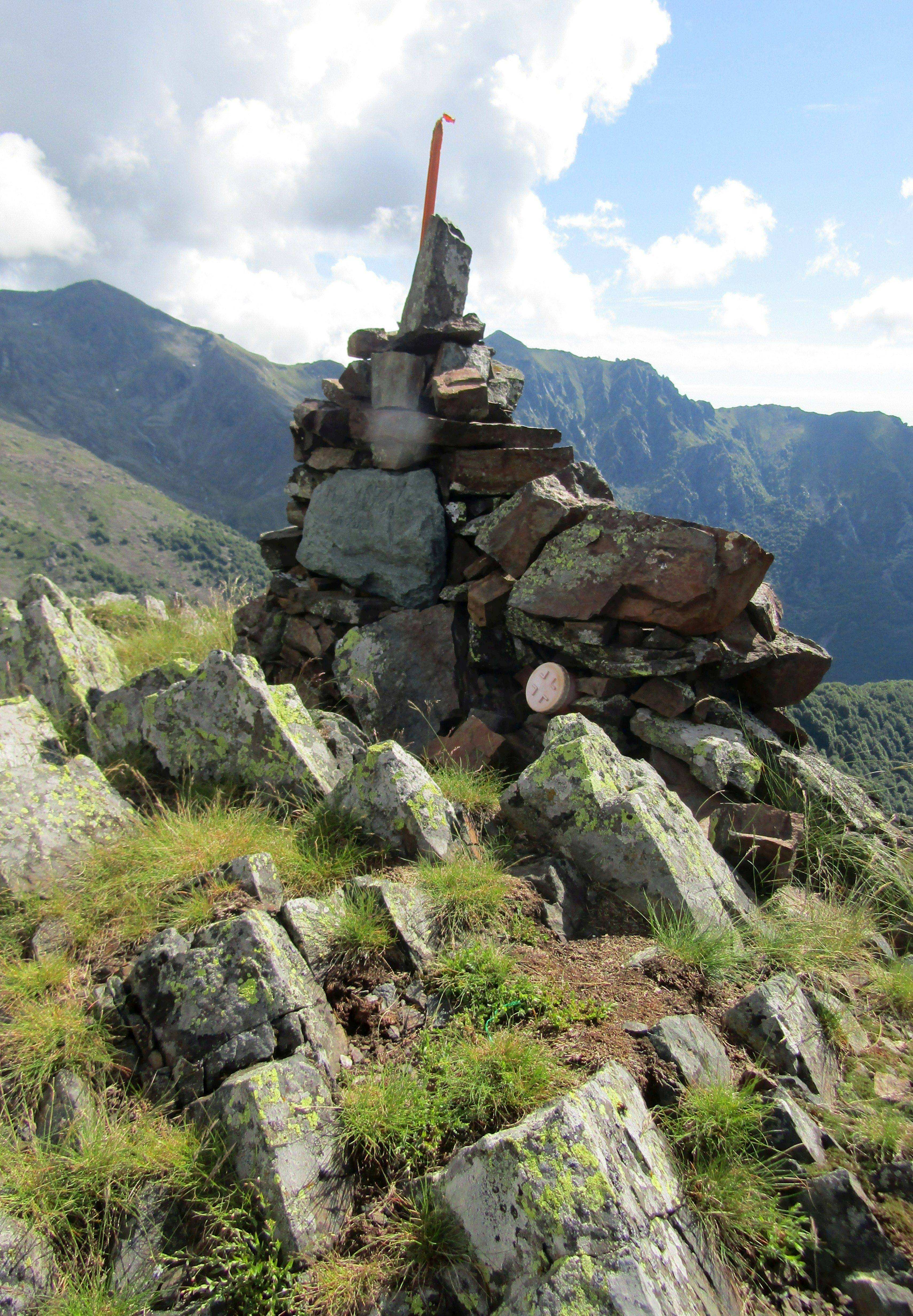 L'ometto sulla sommità del Monte Tumolera (Alpi Graie)